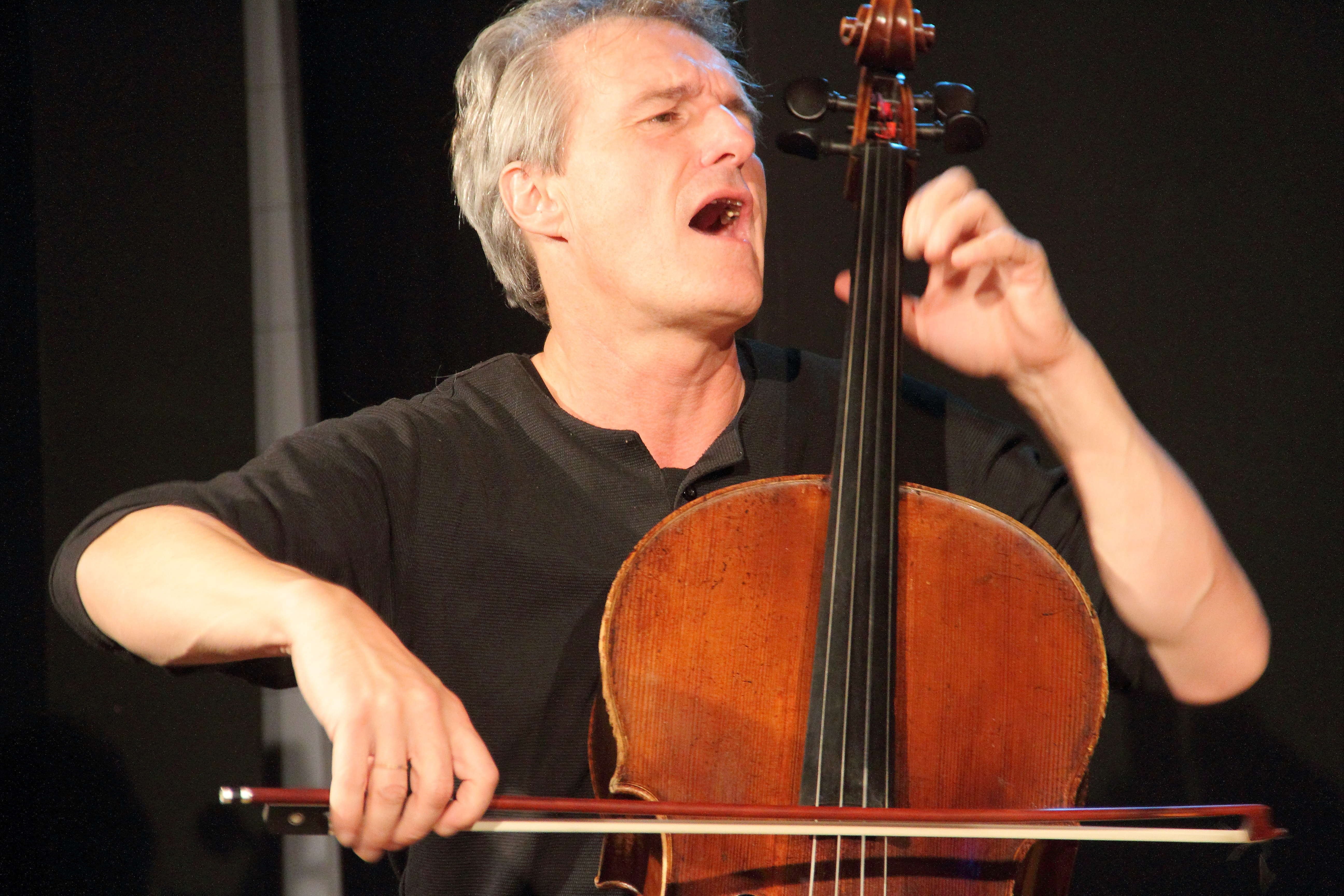 Das East-West Trio im KULT Niederstetten. Das frei improvisierende Trio besteht aus Xu Fengxia (guzheng, sanxian, voc), Didier Petit (cello) & Sylvain Kassap (cl).